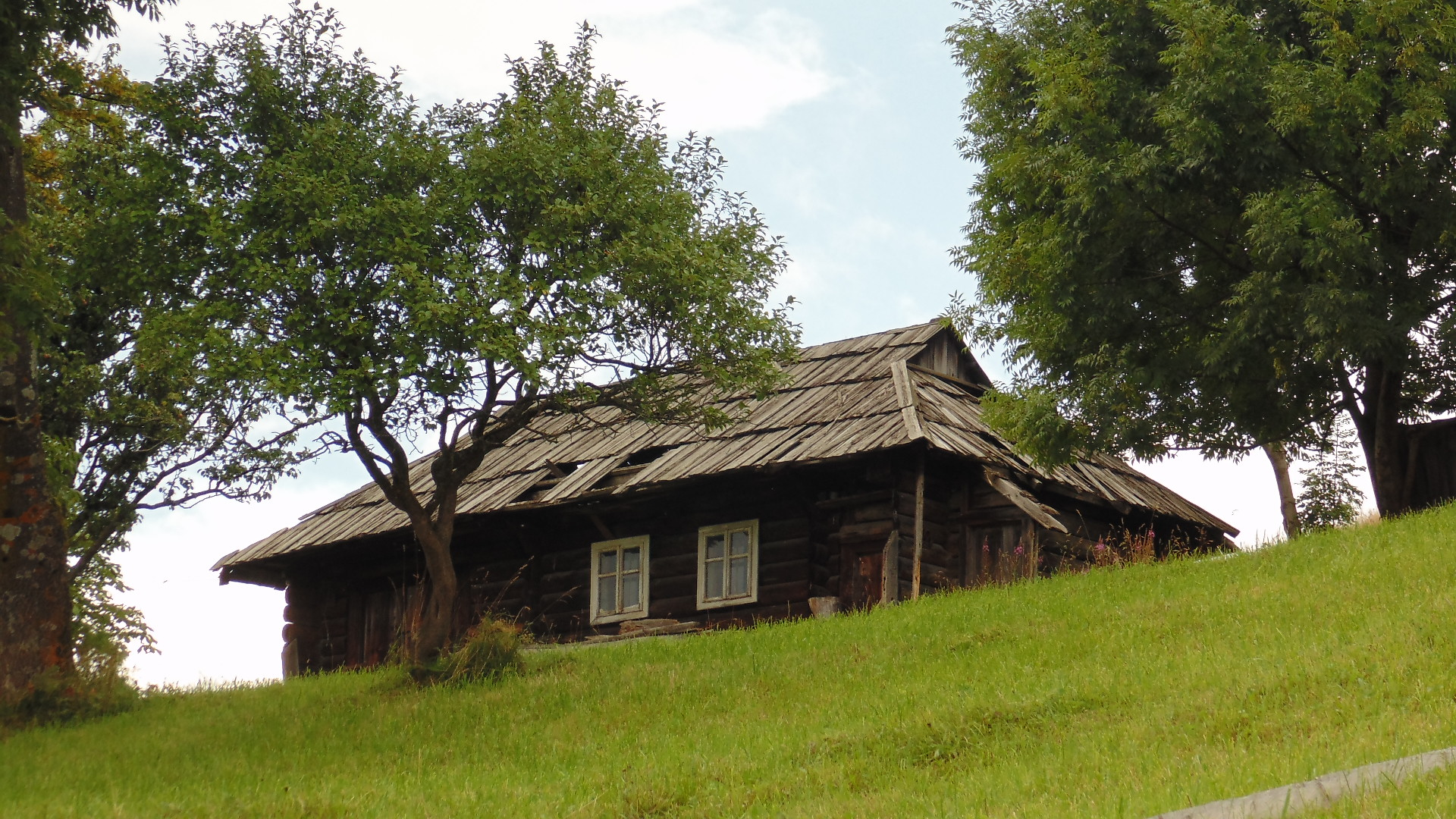 Стародавня гуцульська хата в якій вже ніхто не живе. Село Замагора, Верховинськмй р-н.